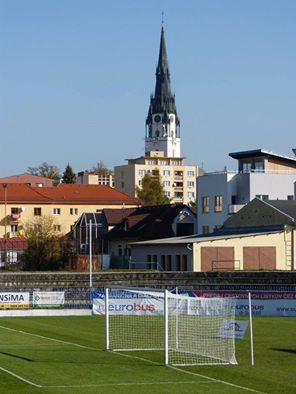 veža FK